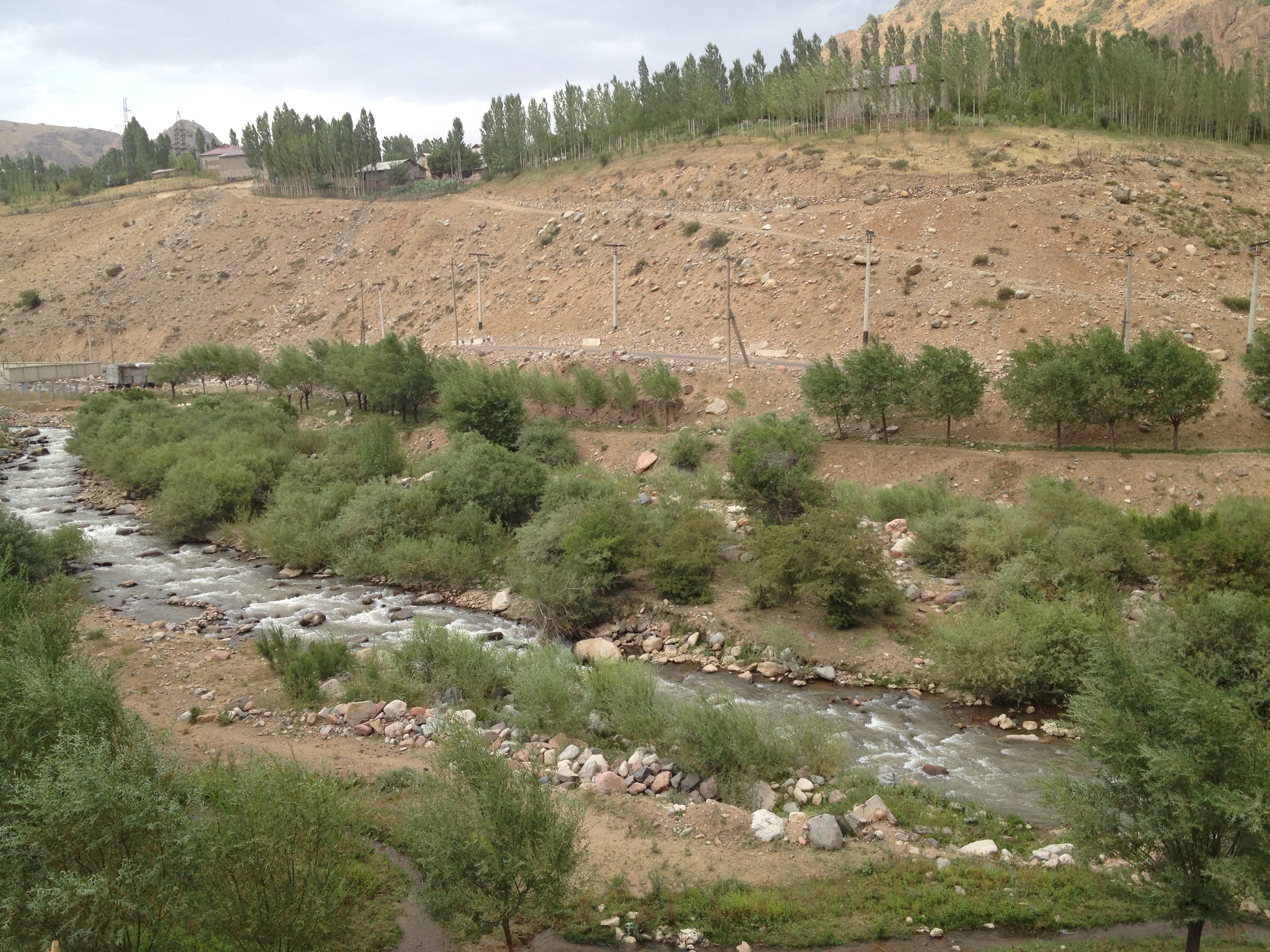 Нижний бьеф ГЭС Эрташсай